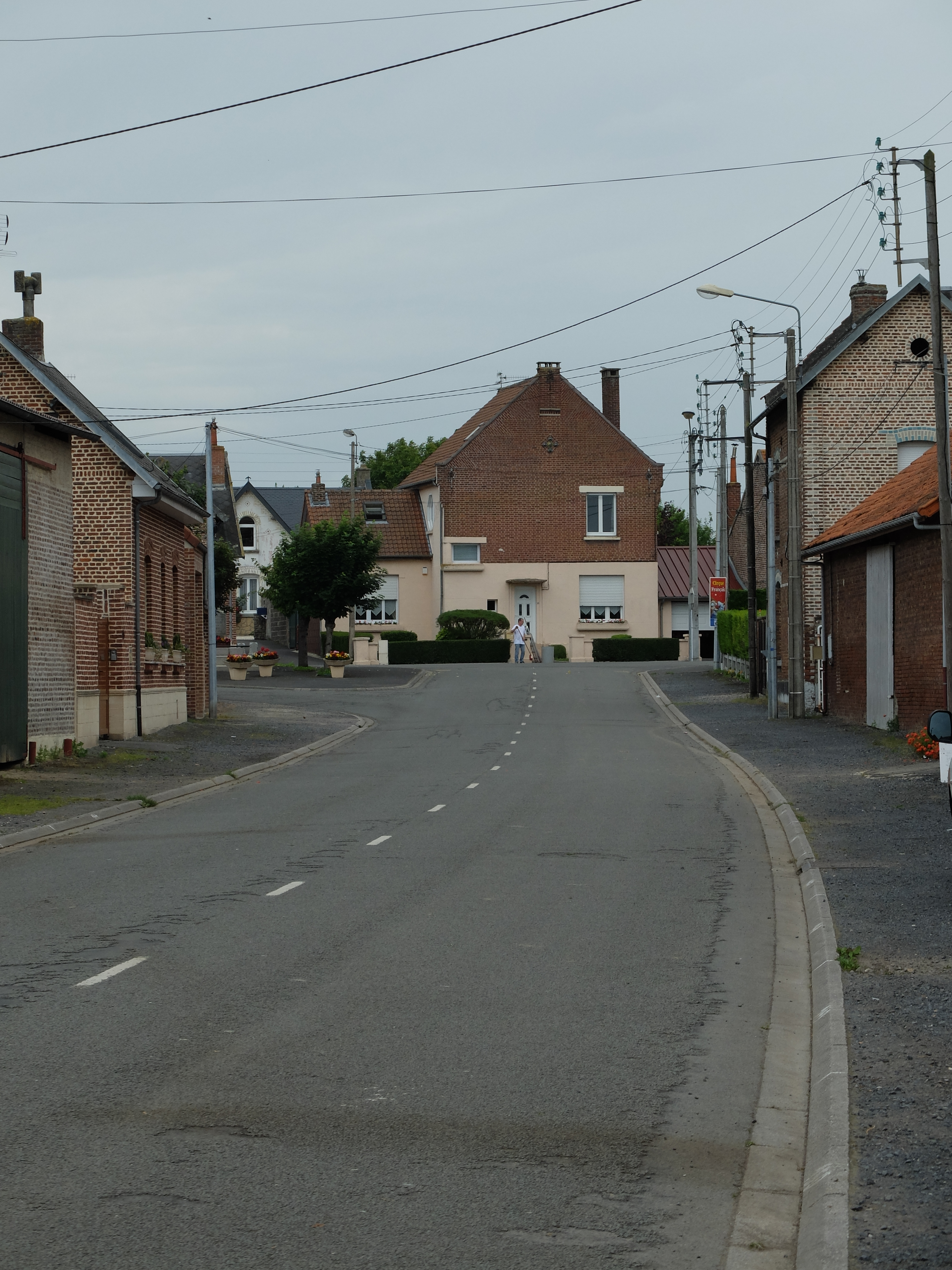 Vue de la Grand rue de Plouvain, entre l'église et le monument aux morts.